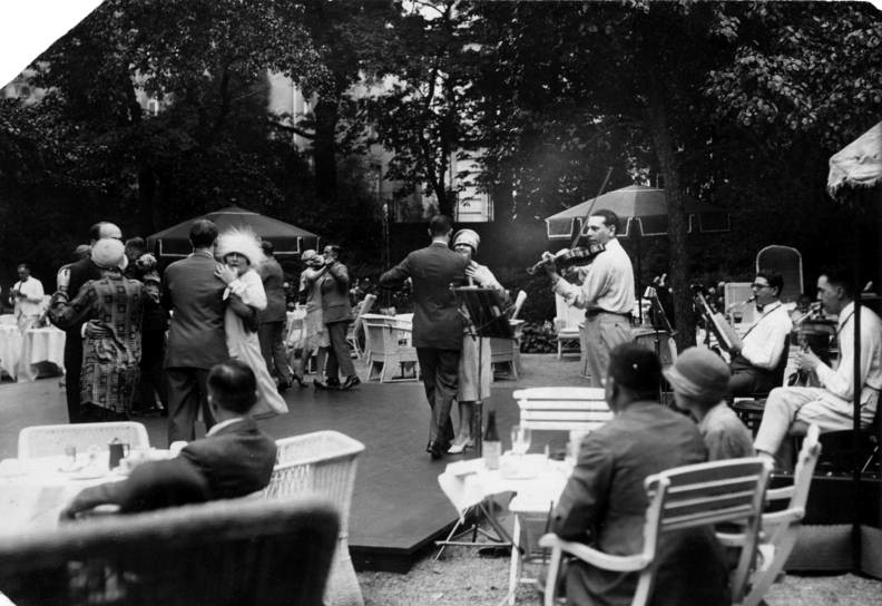 Berlin, Tanztee im "Esplanade" ADN-Zentralbild/ Archiv Berlin 1926 Im Garten des Berliner Hotels "Esplanada" spielt zum 5 Uhr-Tee eine Jazzband. 17187-26